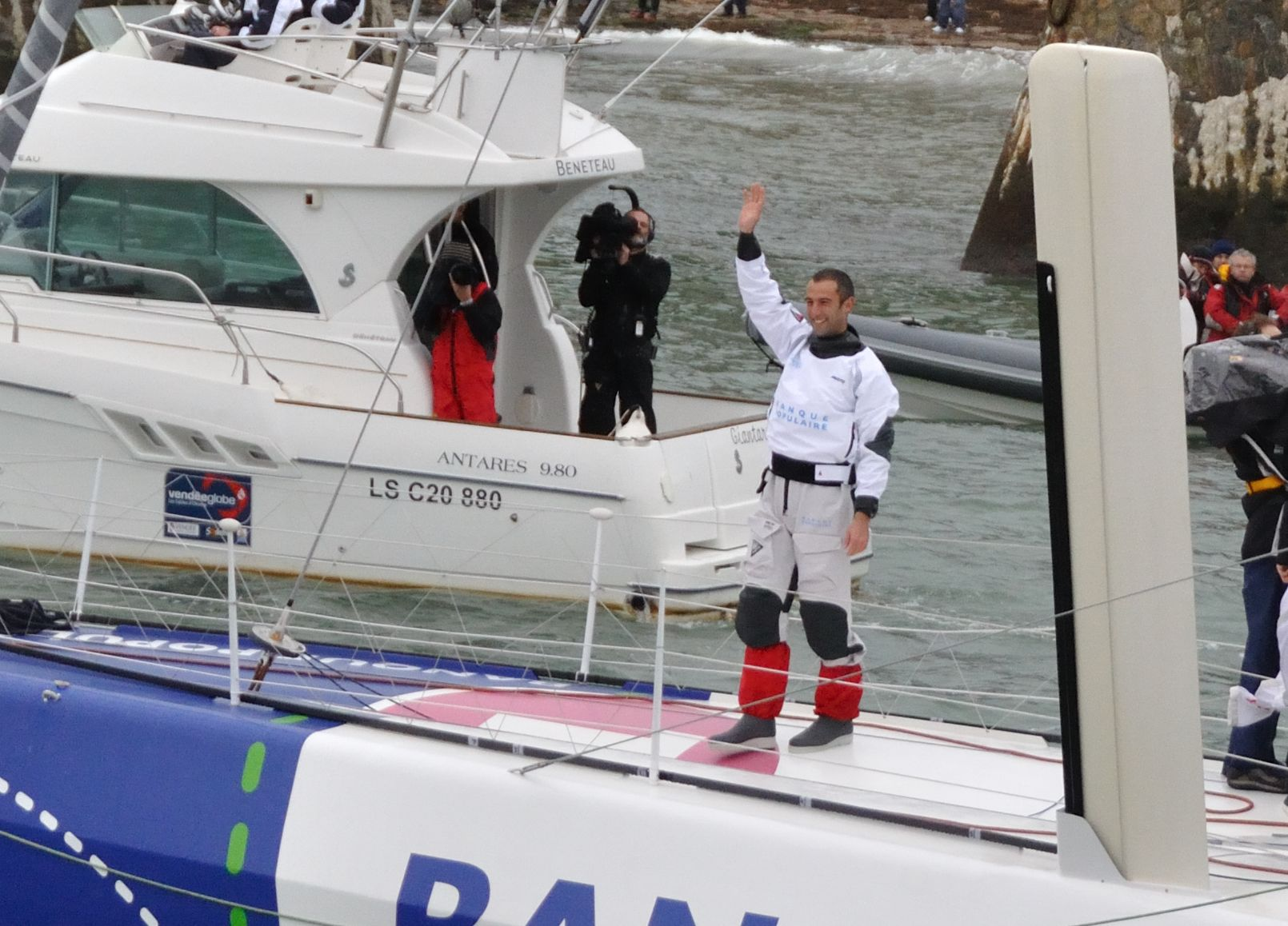 Vendée Globe 2012-2013 : Armel Le Cléac'h sur Banque populaire au départ des Sables d'Olonne